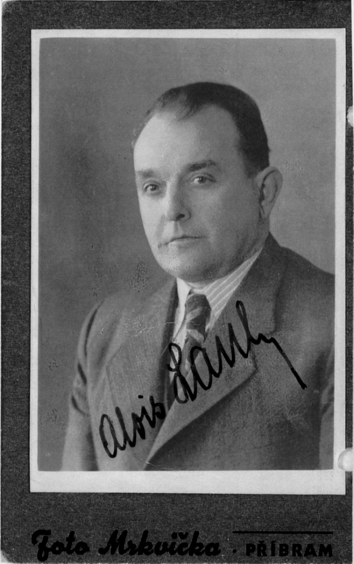 Snímek Aloise Lauba z doby jeho pobytu v Příbrami po listopadu 1939